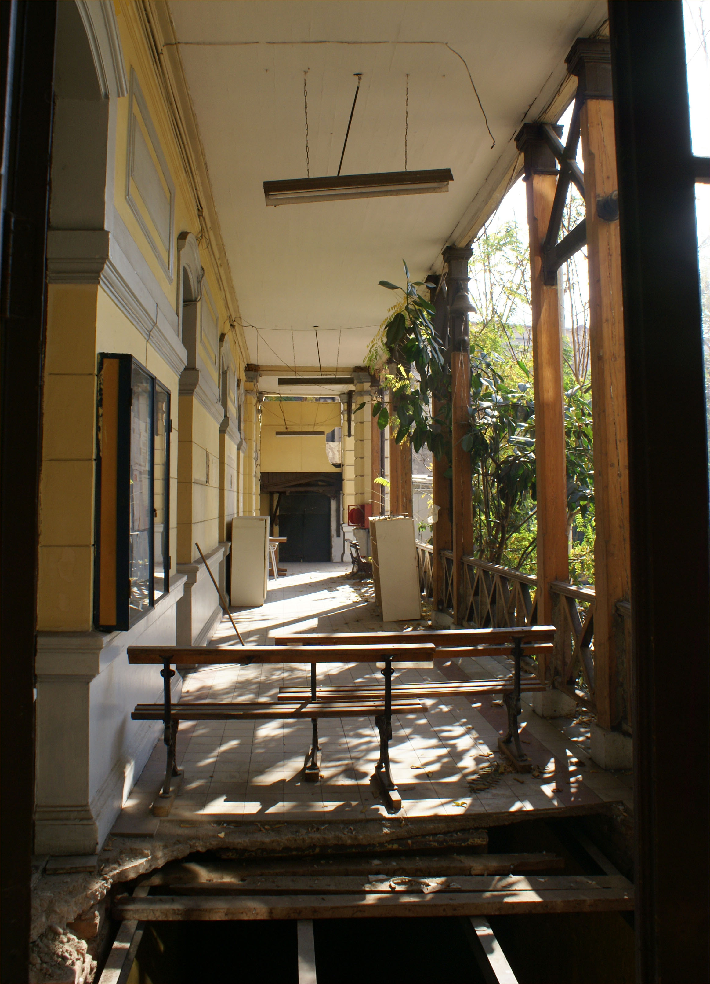 Veinticuatro alumnos del Liceo de Aplicación resultaron con lesiones leves, luego que parte de la losa del primer piso cediera y provocara un derrumbe, dejando caer a los estudiantes hacia el túnel del establecimiento.